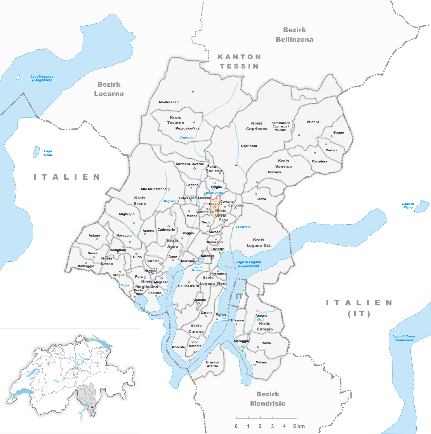 Municipality Cureglia